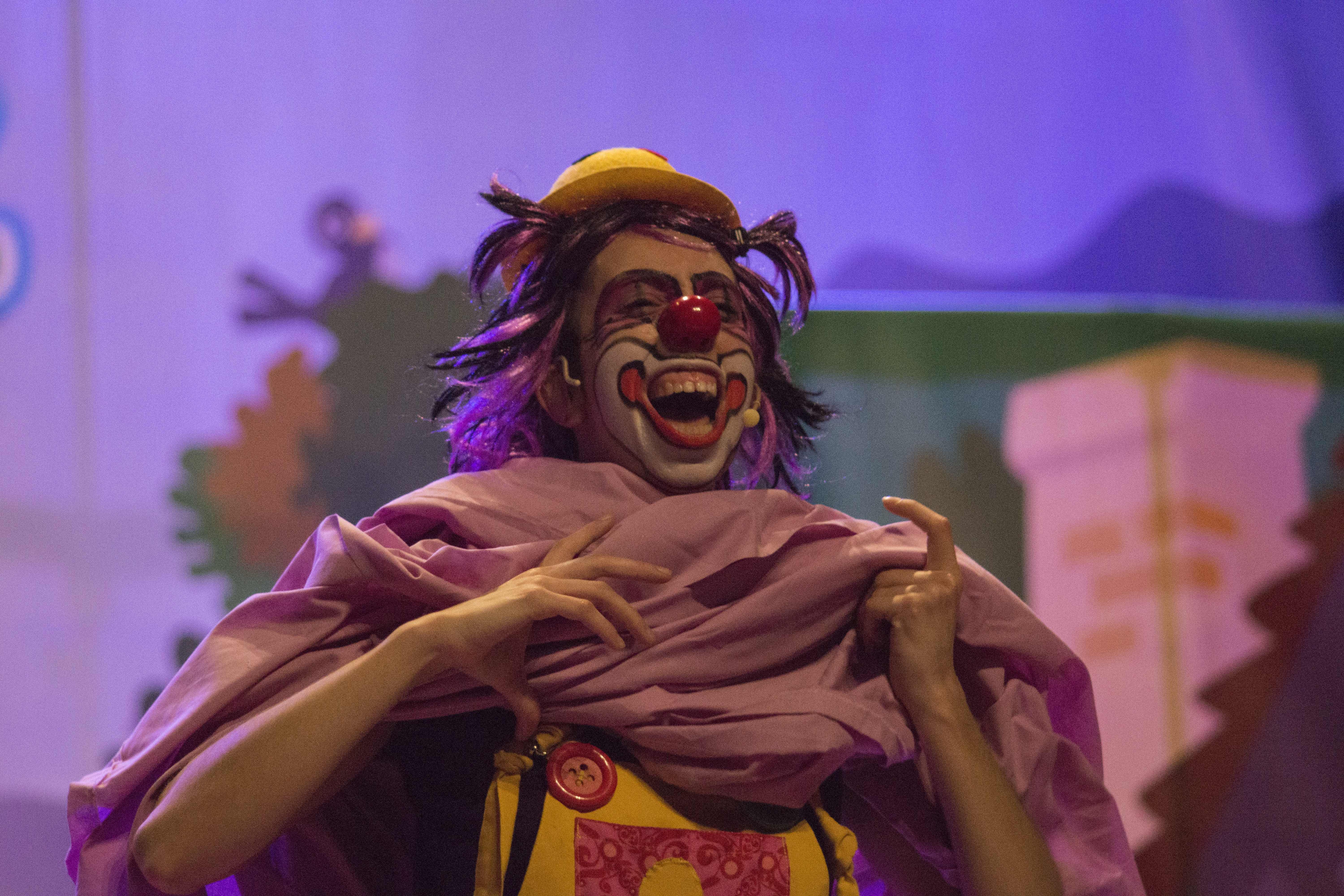 LOTX